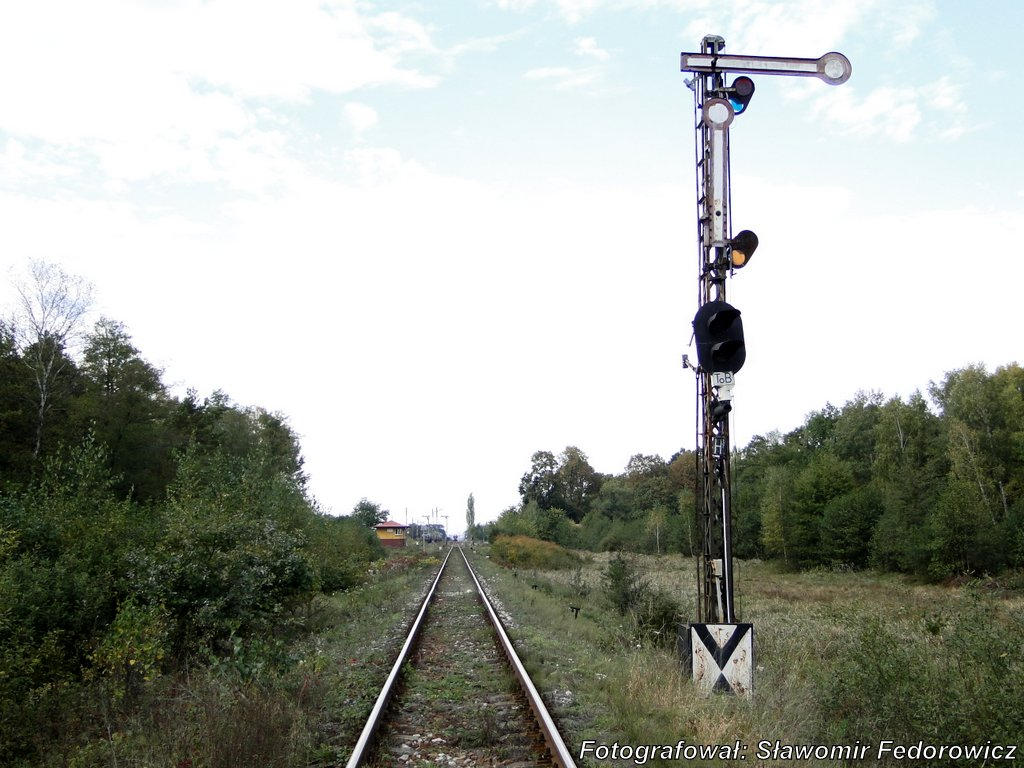 Semofor kształtowy z tarczą świetlną